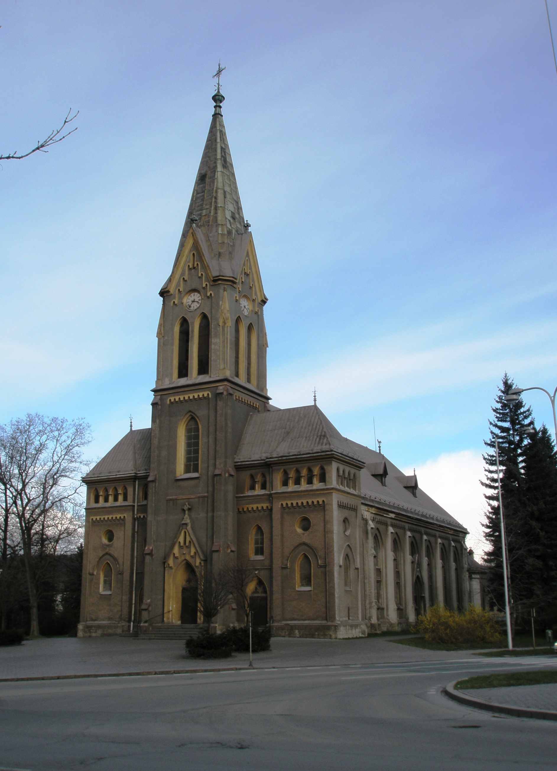 Evangelický kostel v Třinci, okres Frýdek-Místek Lutheran Church in Třinec, Frýdek-Místek District, Czech republic